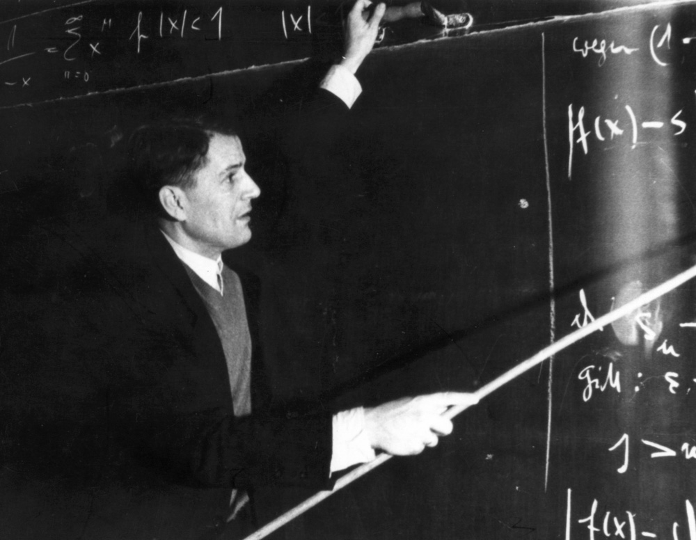 Prof. Dr. Herbert Beckert bei einer Vorlesung am Mathematischen Institut der Universität Leipzig (ca. 1957)